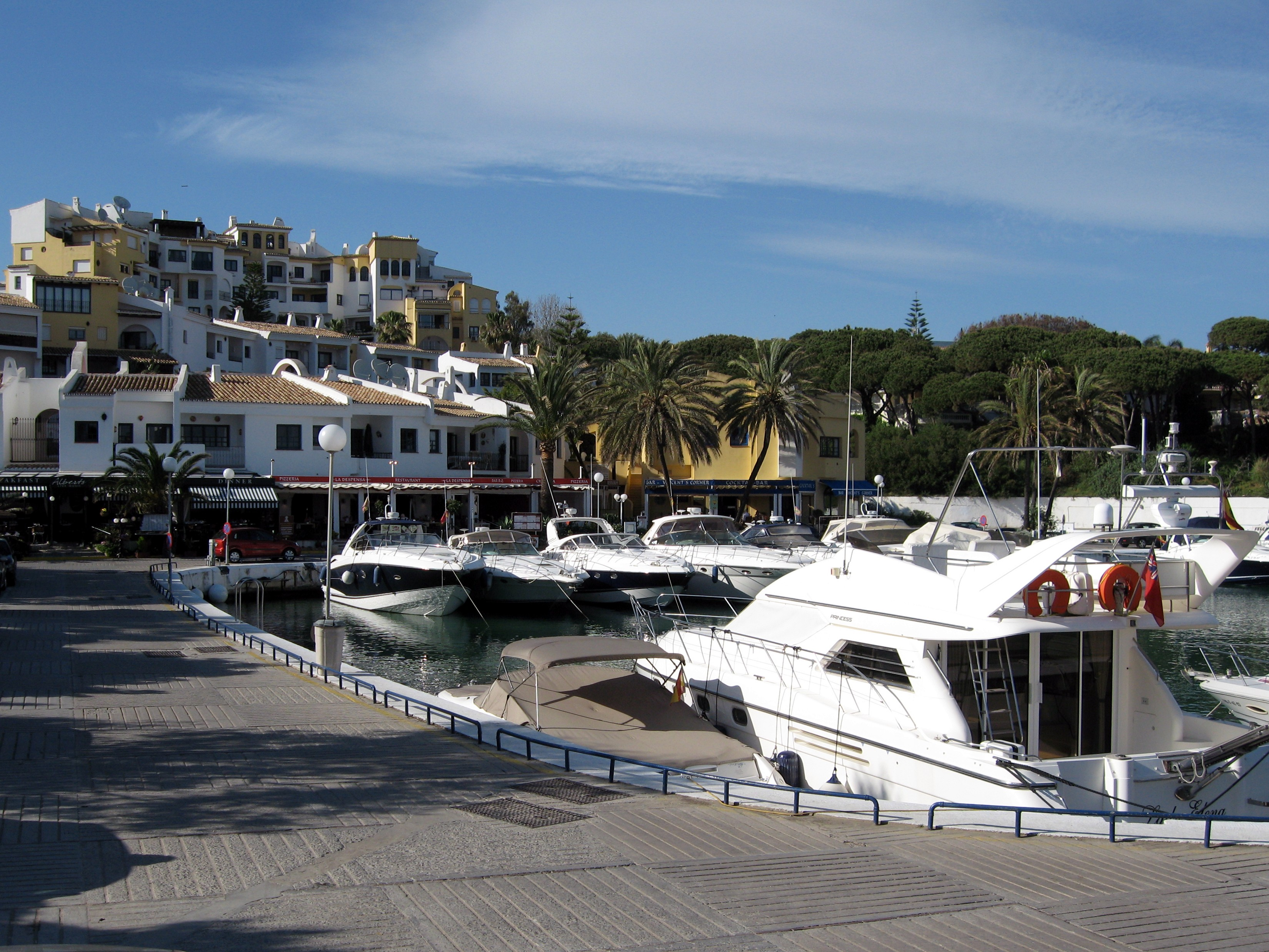 Hafen von Cabopino, Ortsteil von Marbella, Provinz Málaga, Andalusien, Spanien